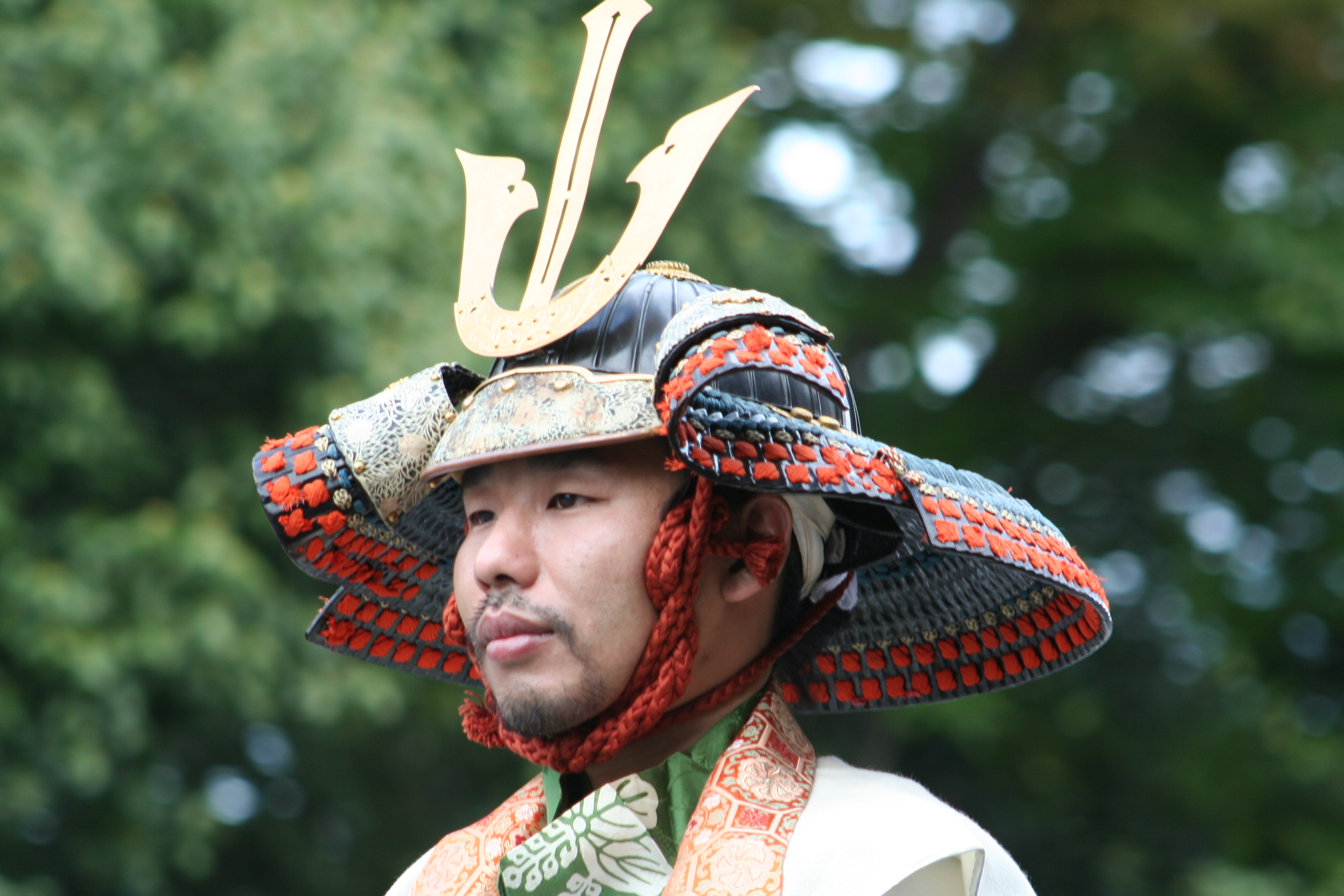 京都府京都市にて開催された時代祭。正午の御所から平安神宮までの行進の様子。2009年10月22日撮影。